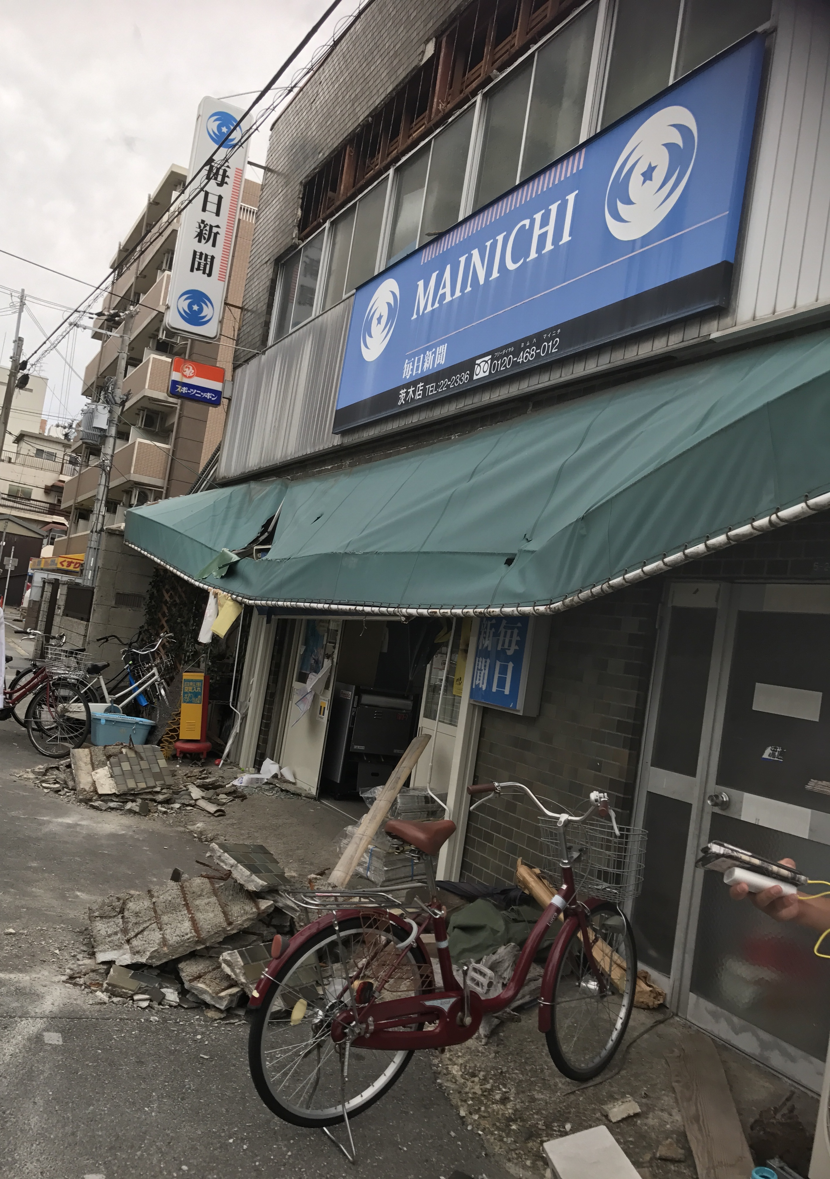 大阪府茨木市竹橋町にて、被害を受けた毎日新聞販売店。 瓦礫がまとめられている。